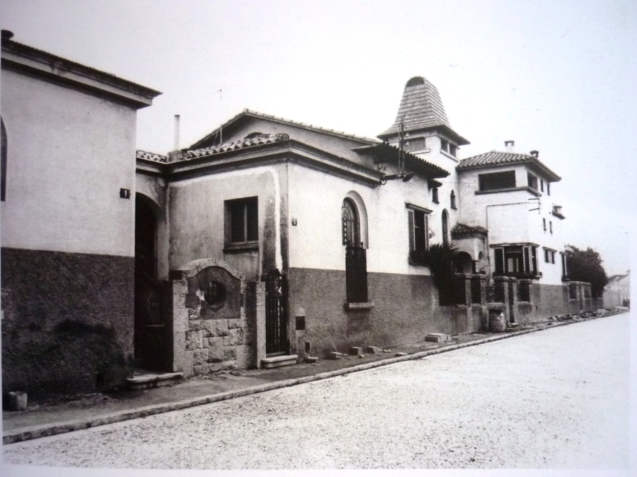 Urbanització Teixidor. 4 cases